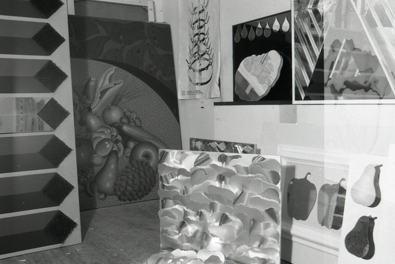 Servizio fotografico : Bologna, 1969 / Paolo Monti. - Strisce: 1, Fotogrammi complessivi: 6 : Negativo b/n, gelatina bromuro d'argento/ pellicola ; 35 mm. - ((I fotogrammi hanno una doppia numerazione. . - Sul portanegativi: Nikon Agfa 21. - Sul dorso del portanegativi Monti specifica: "Bologna, Via Marsala 34". - Occasione: Documentazione opere per Galleria Dè Foscherari. - Fonte: Fattura di Paolo Monti: IV. Commesse/ Fattura (1969/03/05), presso Archivio Paolo Monti